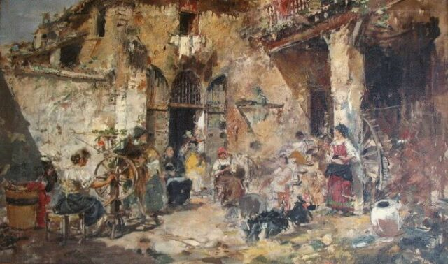 Vicente March - Patio romano Fuente Autor: ® JLRM